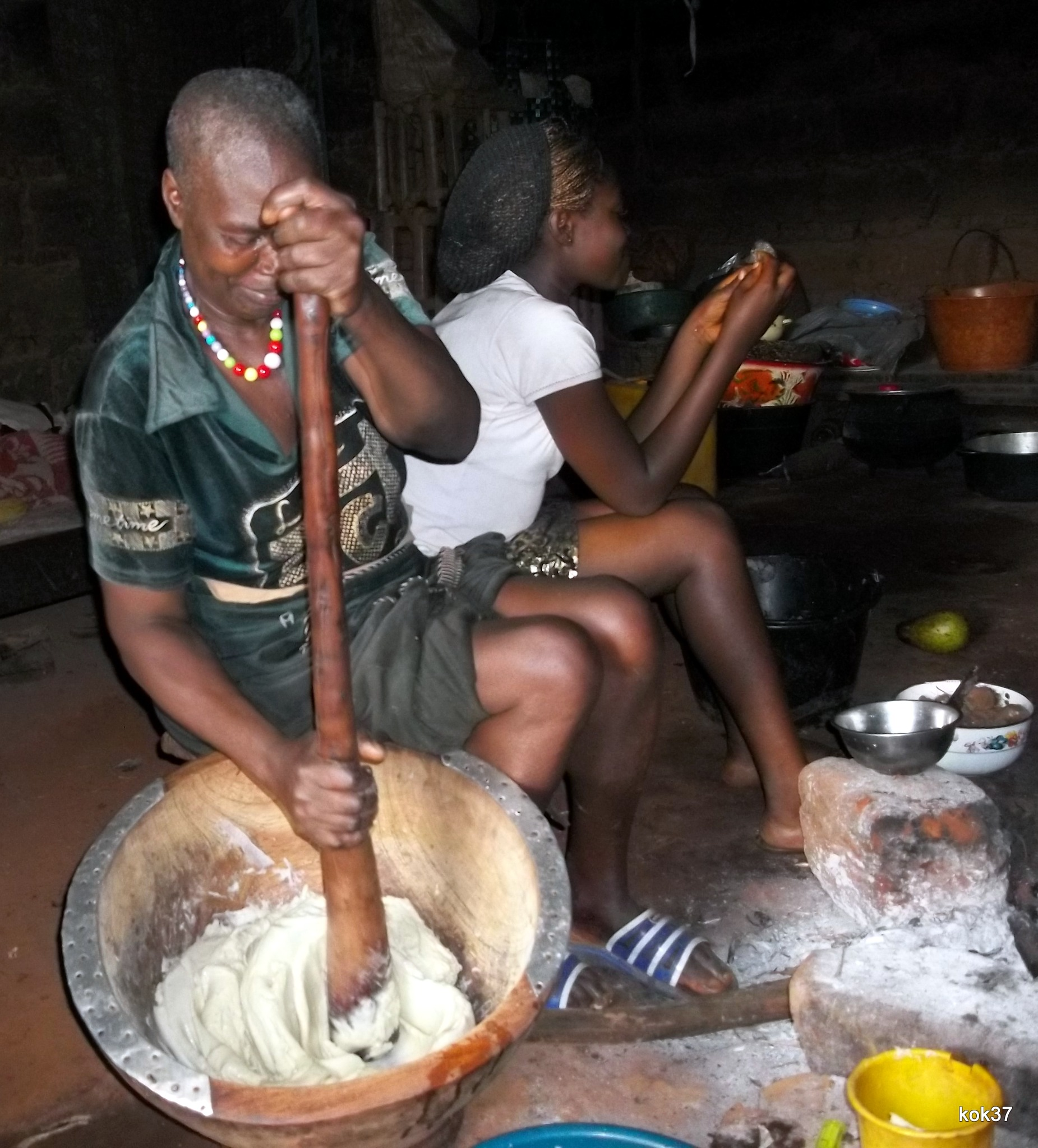 Le taro est un plat d'honneur préparé pour attendre des invités de marque